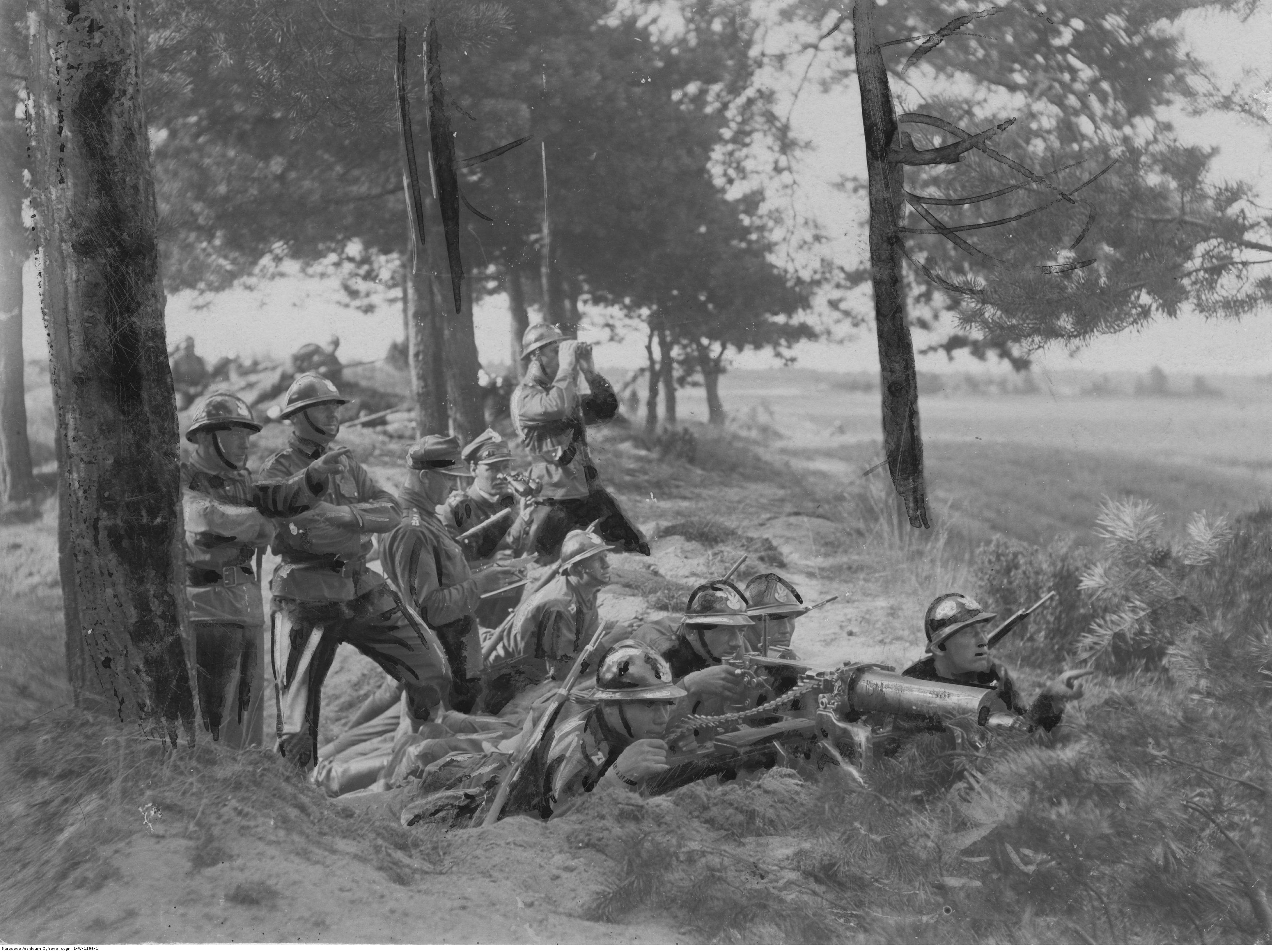 Ćwiczenia 21 pułku piechoty. Żołnierze z ckm na pozycji przy drodze. Koncern Ilustrowany Kurier Codzienny - Archiwum Ilustracji. Sygnatura: 1-W-1196-1